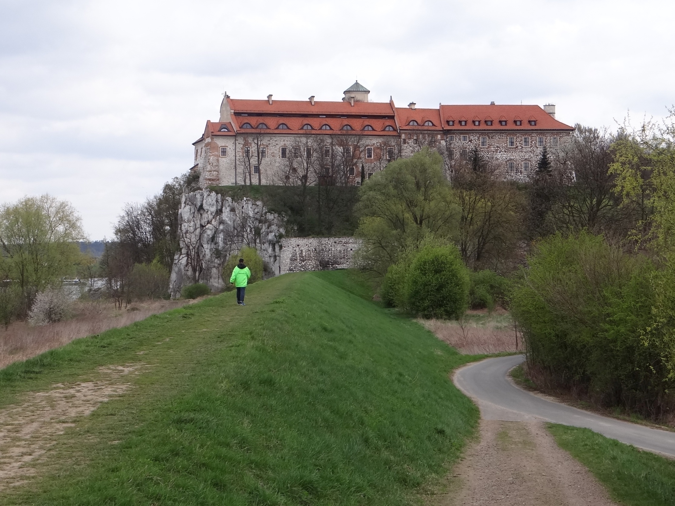 Wzgórze Klasztorne, widok od południa, z wałów wiślanych